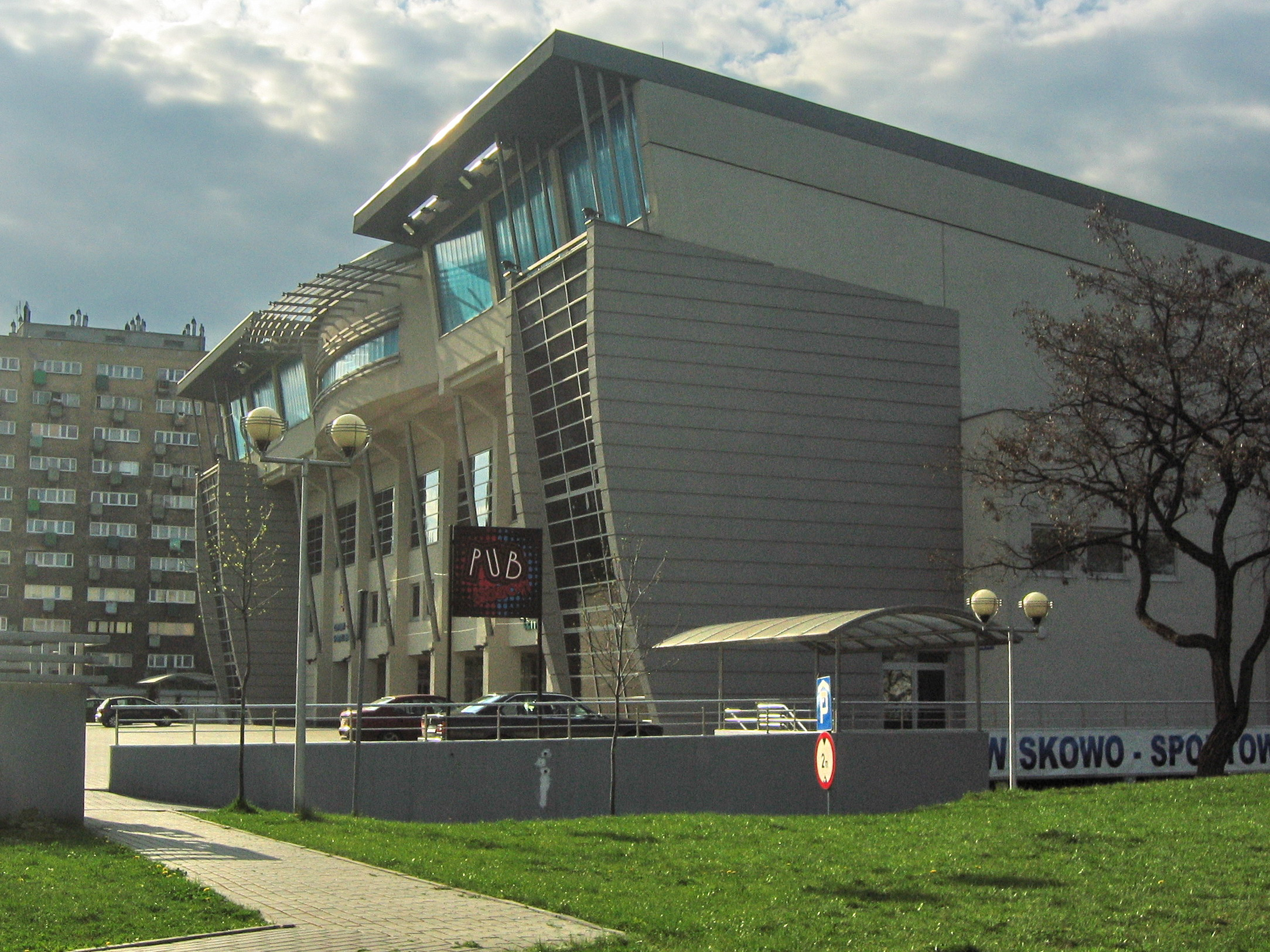 Hala Widowiskowo-Sportowa "Centrum" w Dąbrowie Górniczej